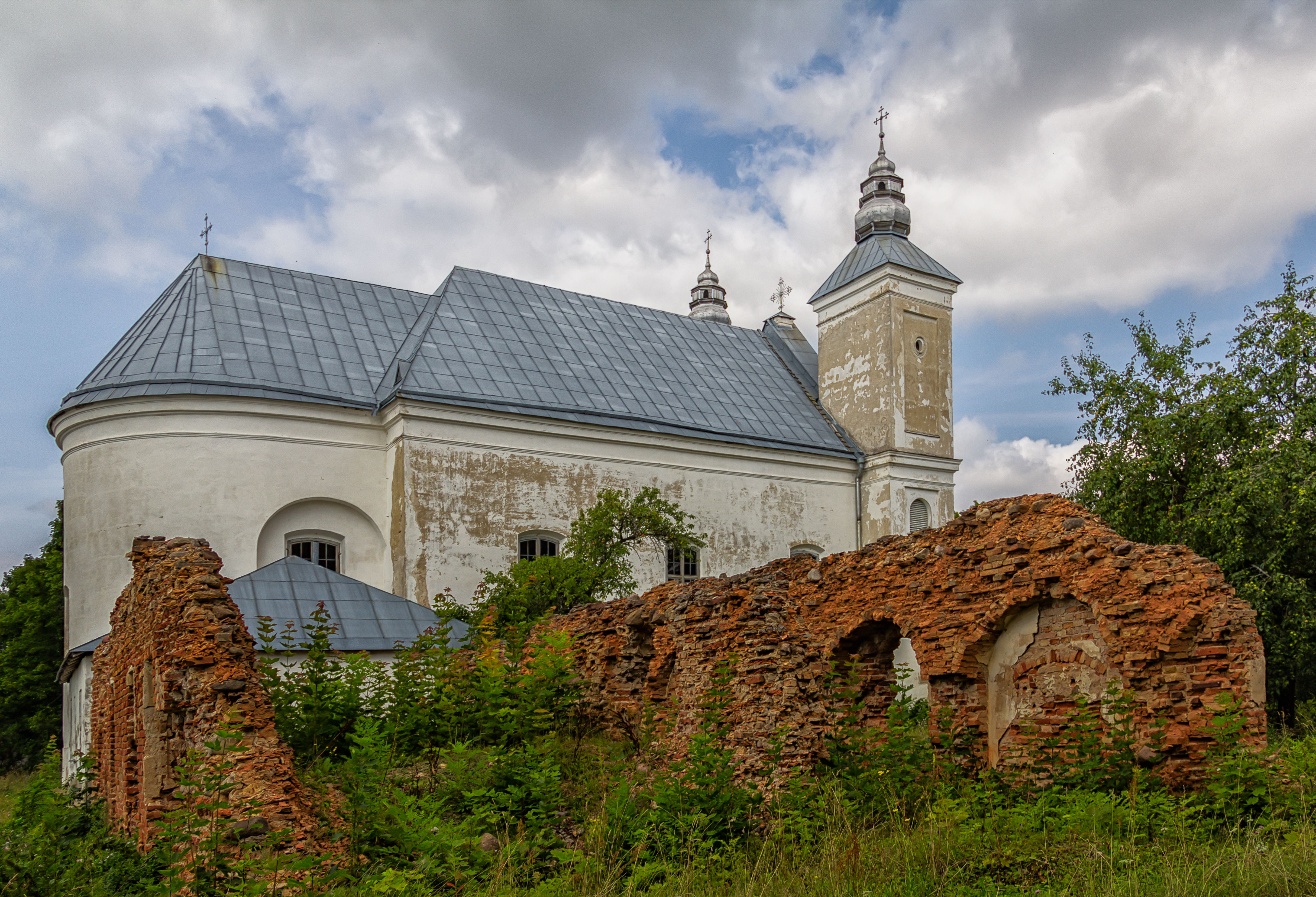 Беларуская (тарашкевіца): Комплекс кляштара кармэлітаў: касьцёл жылы кляштарны корпус вежа-званіца брама. в. Засьвір This is a photo of Belarusian heritage monument. Reference number: 612Г000430 ( WLM)